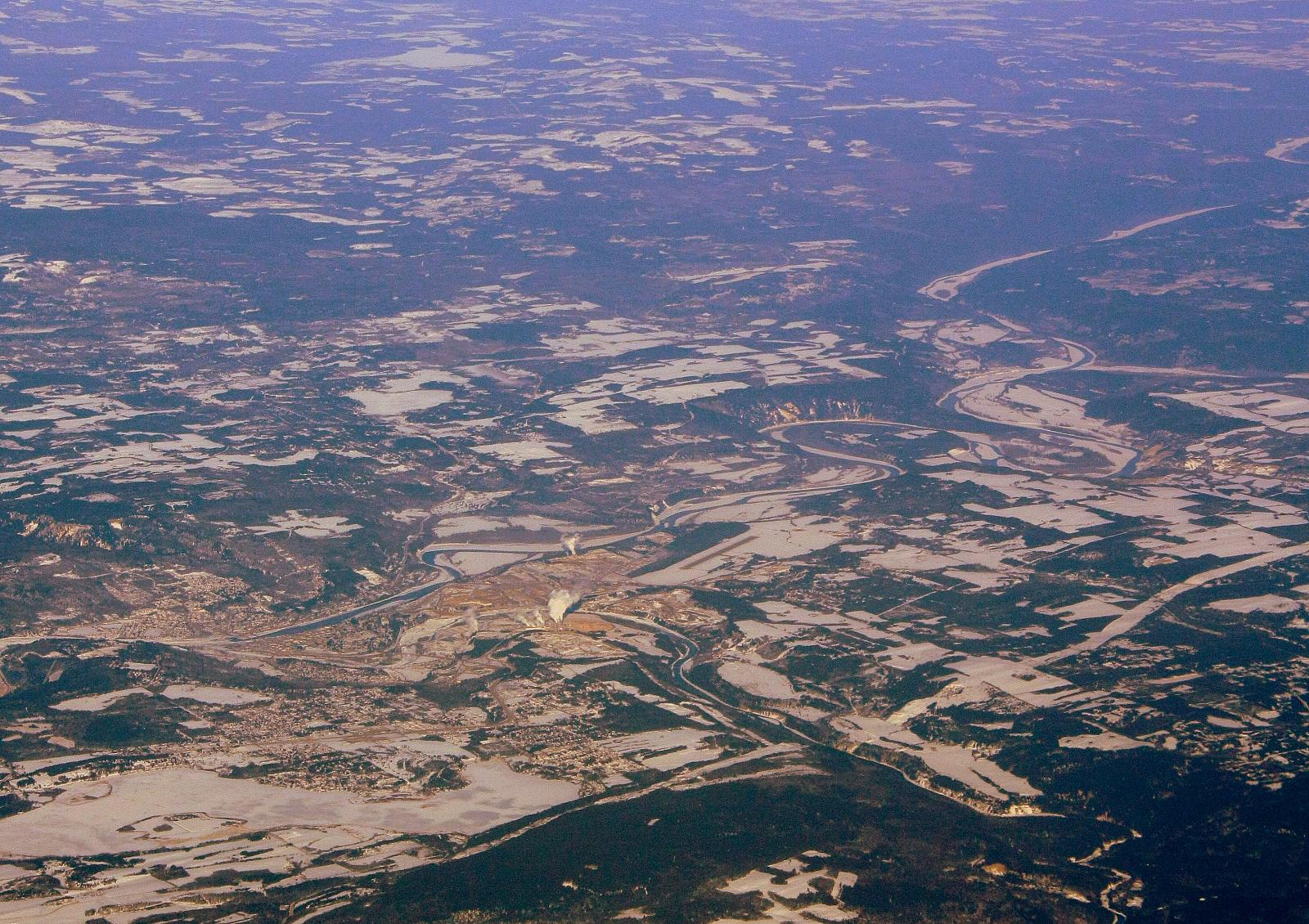 Quesnel, BC